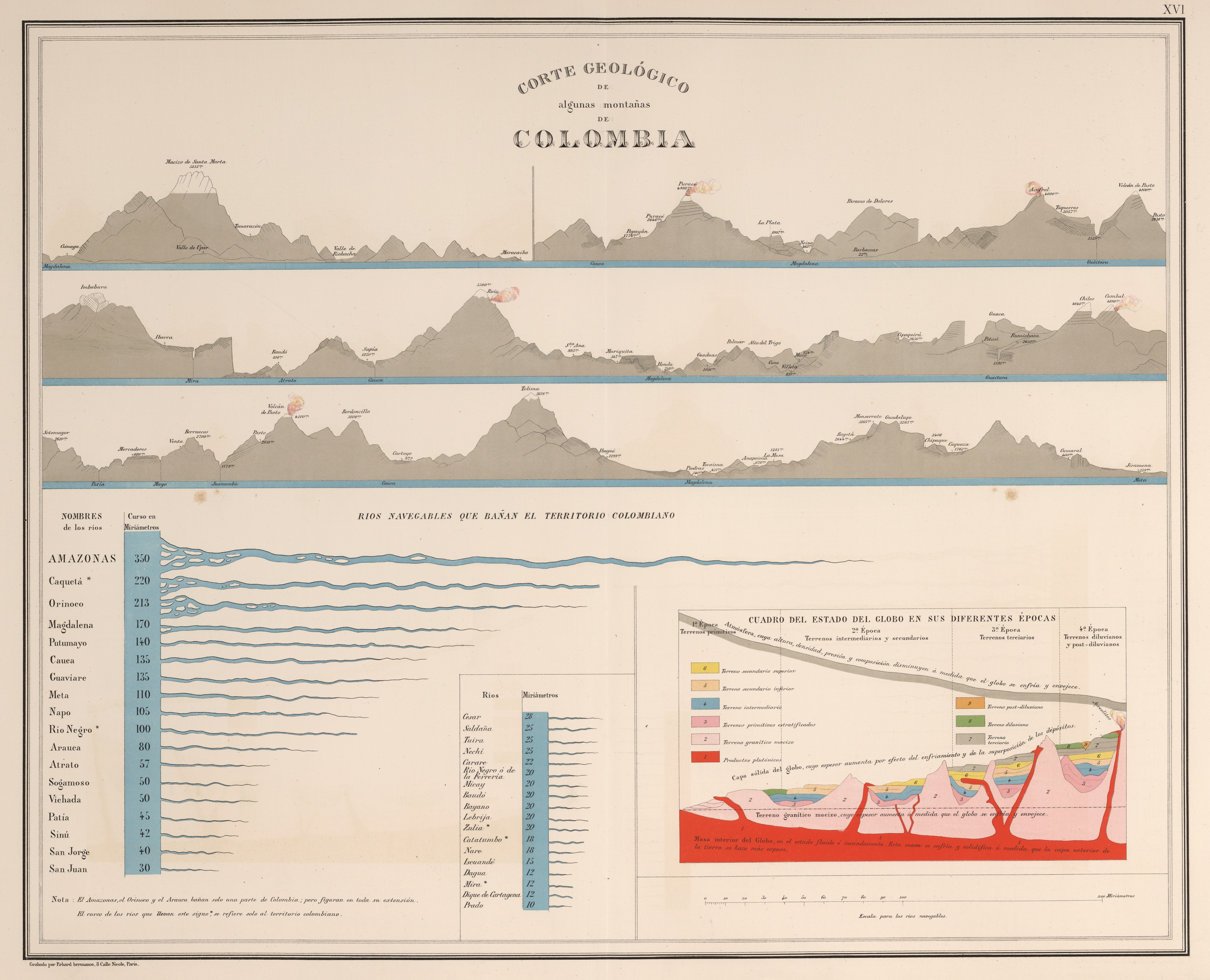 Corte geológico y ríos navegables de Colombia. Carta XVI del Atlas geográfico e histórico de la República de Colombia, 1890.